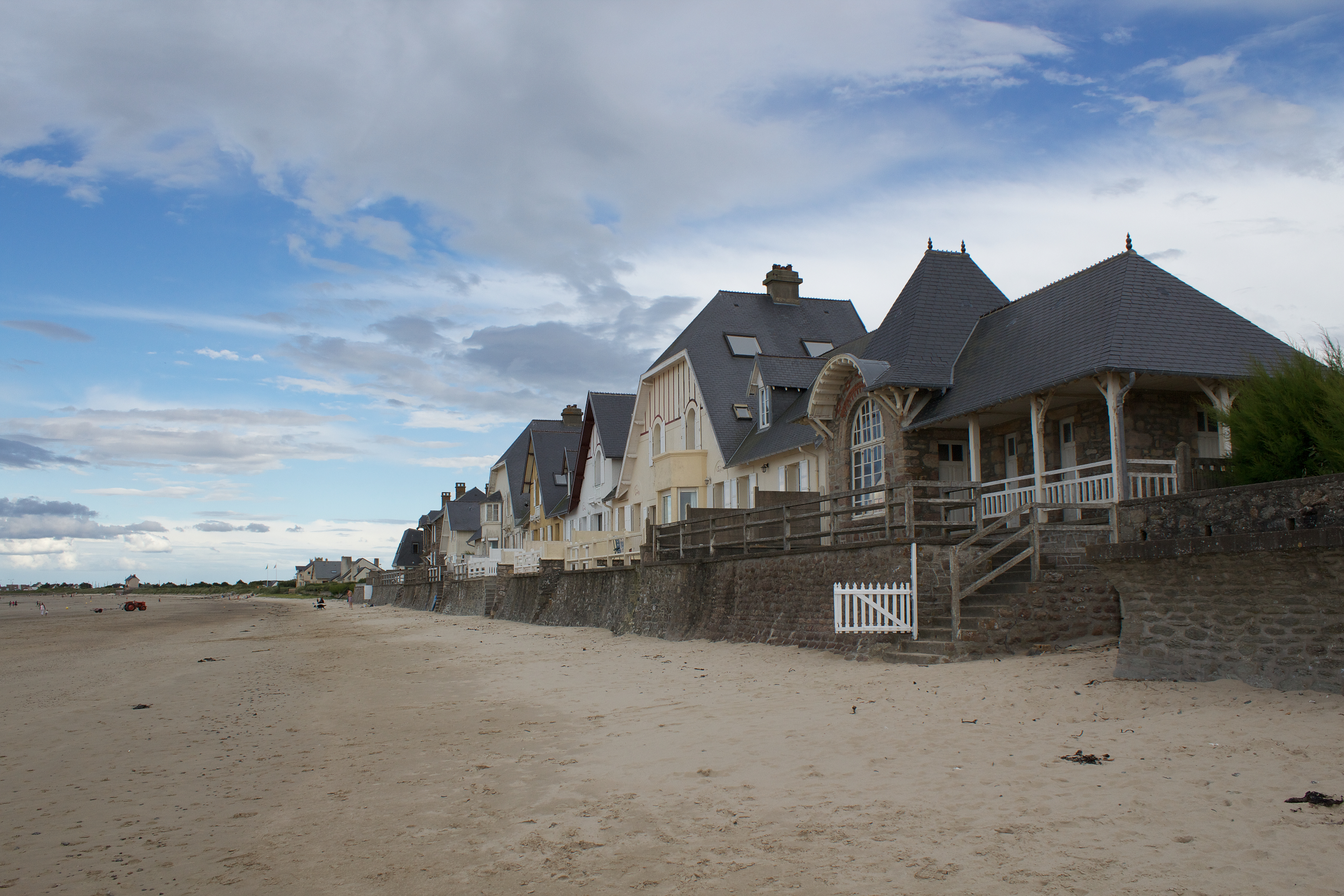 Vue de la plage d'Urville-Nacqueville